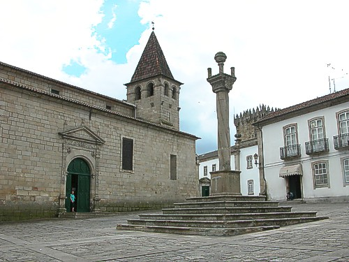 Pelourinho (Chaves - Portugal)